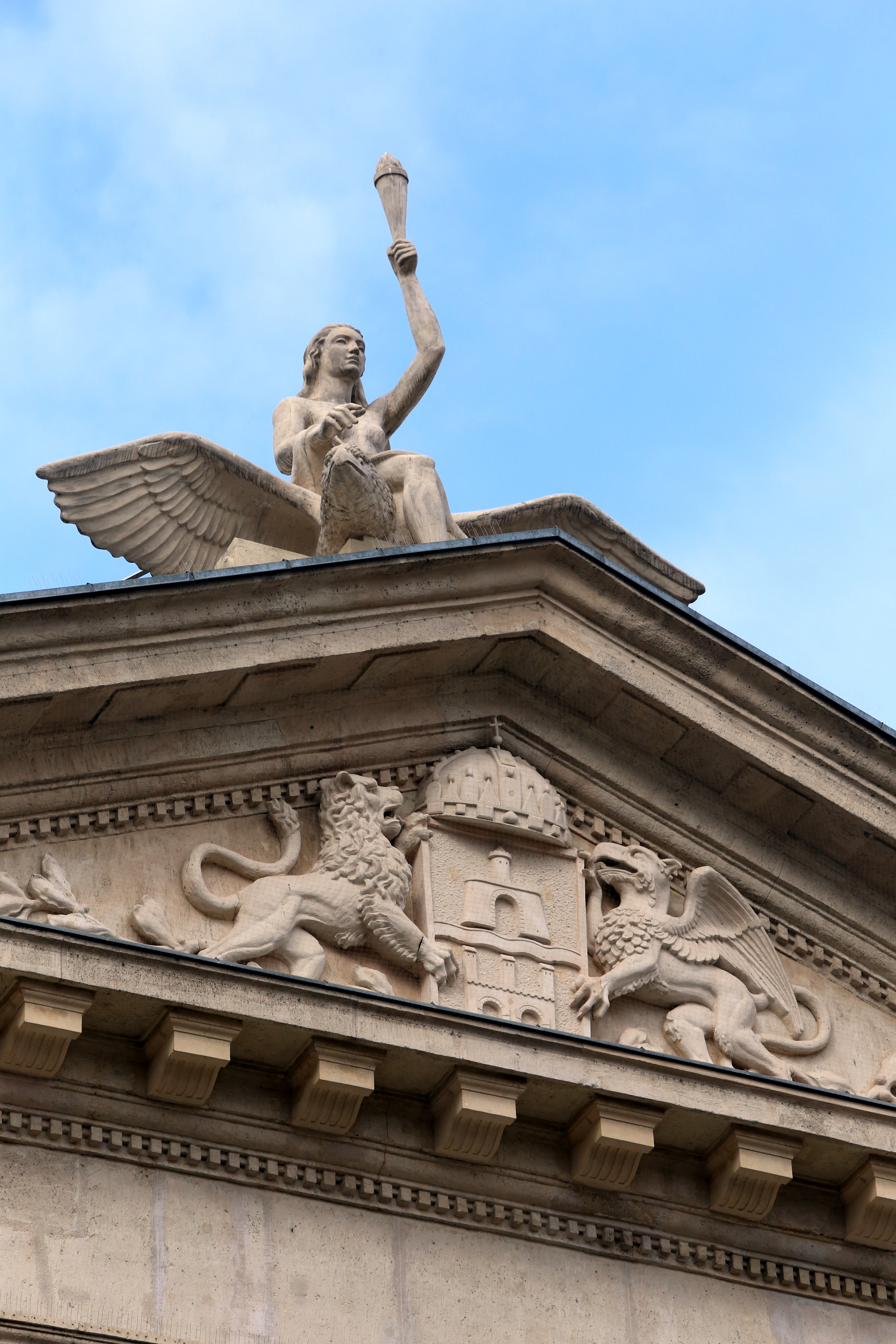 Budai Vigadó This is a photo of a monument in Hungary. Identifier: 12221